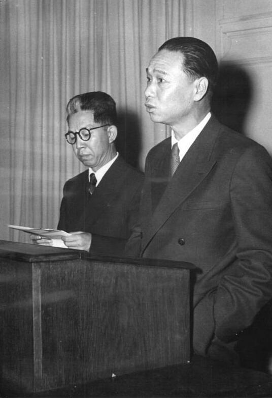 Zentralbild-Gielow 23.5.52 III. Deutscher Schriftstellerkongreß vom 22.-25. Mai 1952 in Berlin. UBz: Der chinesische Botschafter in Berlin Tschi-Peng-Fei übermittelt dem 3. Deutschen Schriftstellerkongreß die herzlichen Grüße der chinesischen Volksrepublik.